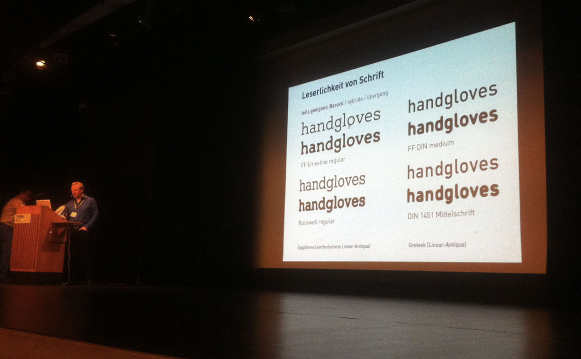 Albert-Jan Pool